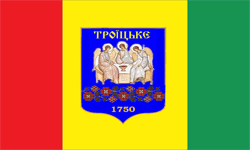 Прапор смт Троїцьке Луганської області